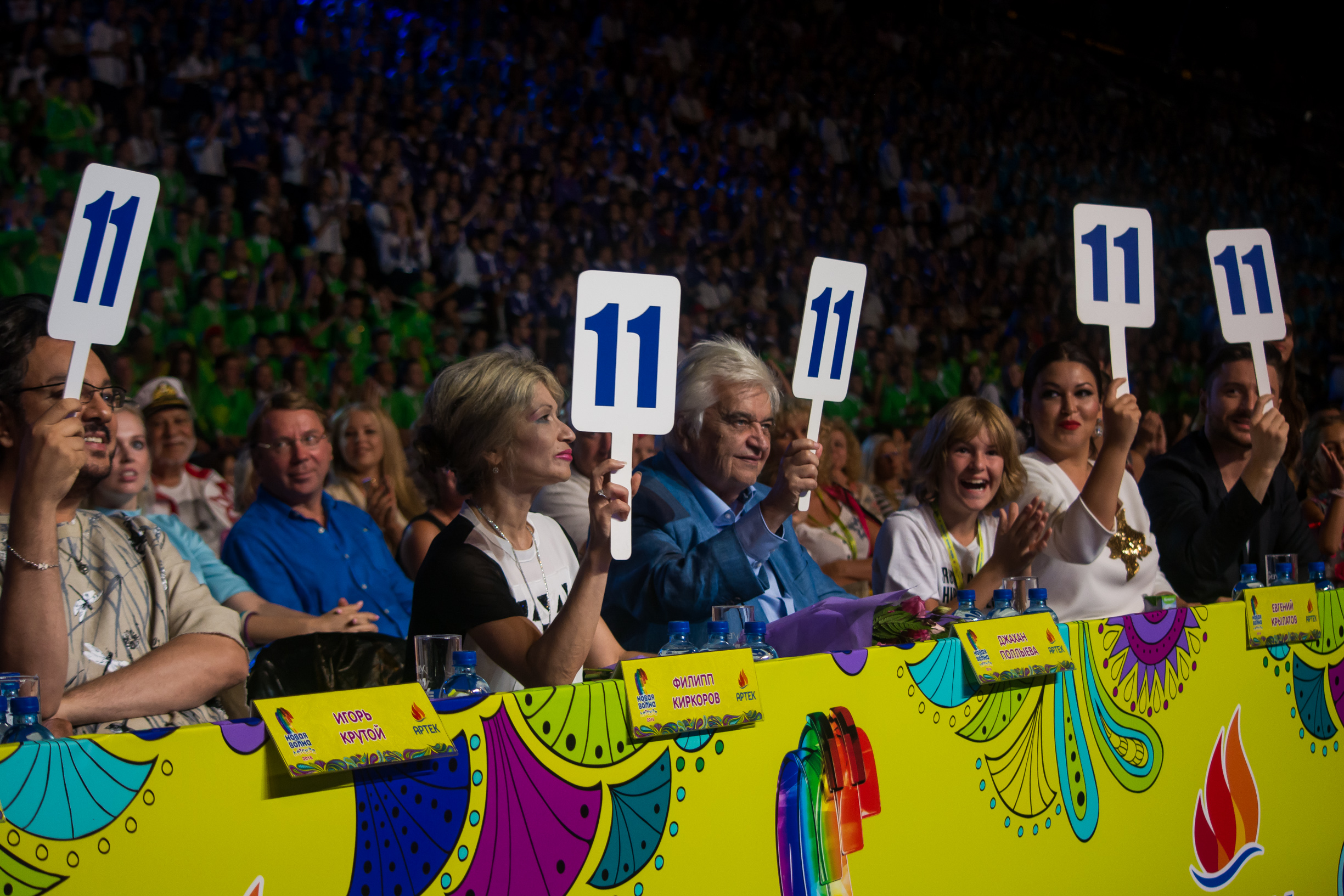 Оценки жюри на Детской Новой волне 2016